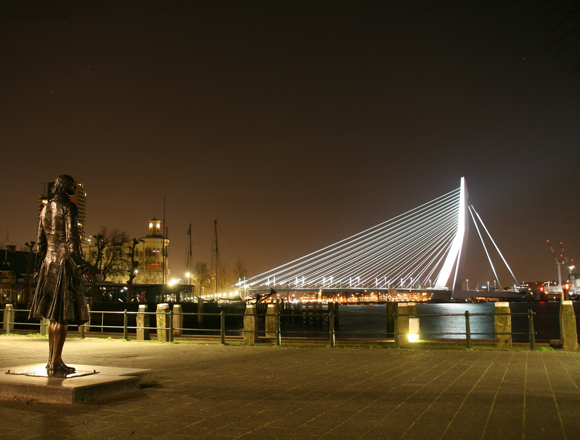 Rotterdam: Erasmusbrug bij avond, gezien vanaf de hoek Veerhaven-Westerkade. Het bronzen standbeeld van tsaar Peter de Grote gemaakt door Leonid Baranov in 1997 kijkt naar de brug.